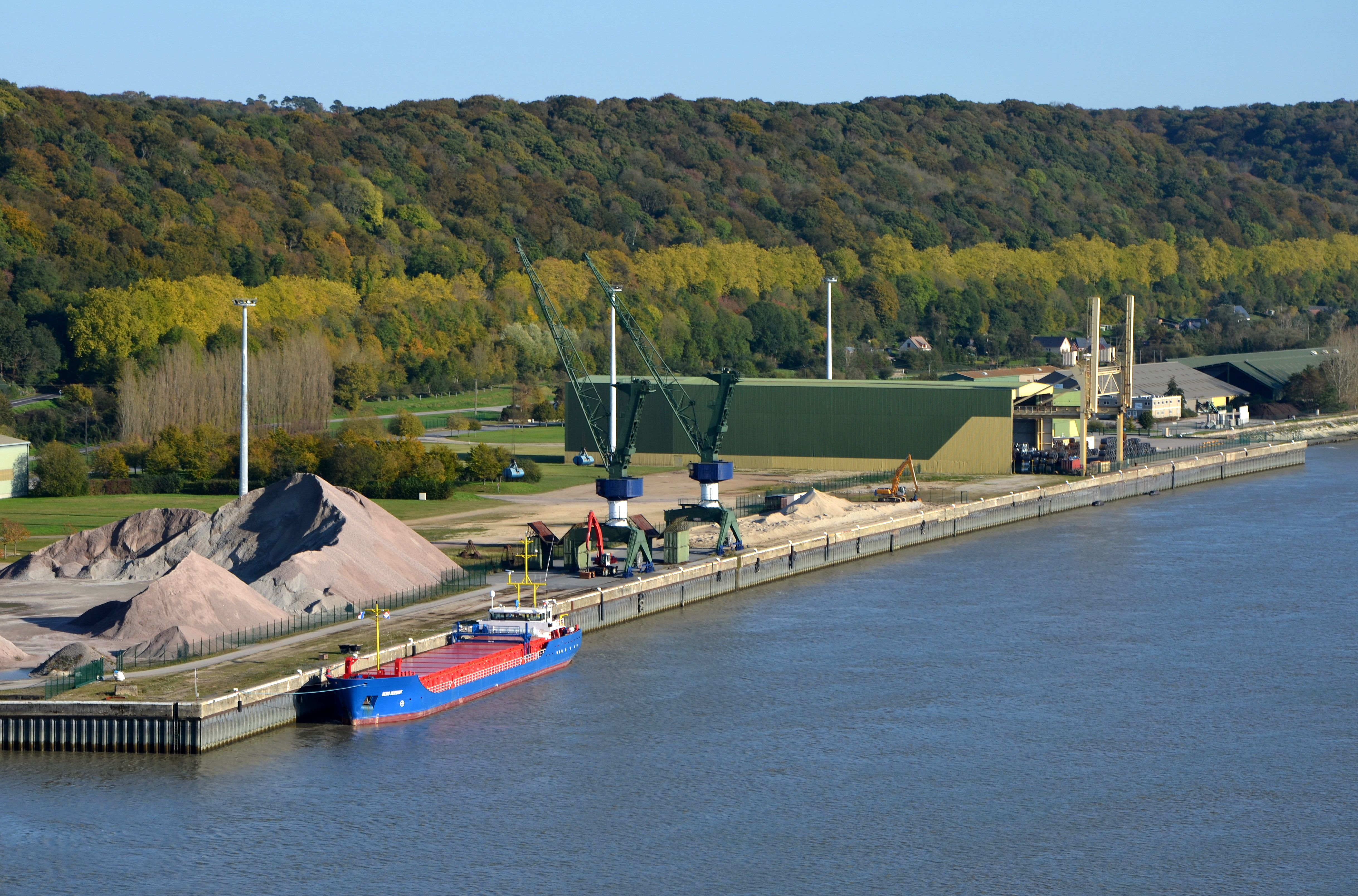 Terminal Saint Wandrille du port de Rouen près du pont de Brotonne, Seine Maritime, FranceEmiliàn e rumagnòl: Wharf and warehouse Saint Wandrille, harbour of Rouen along the Seine river near the bridge of Brotonne, Seine Maritime, France